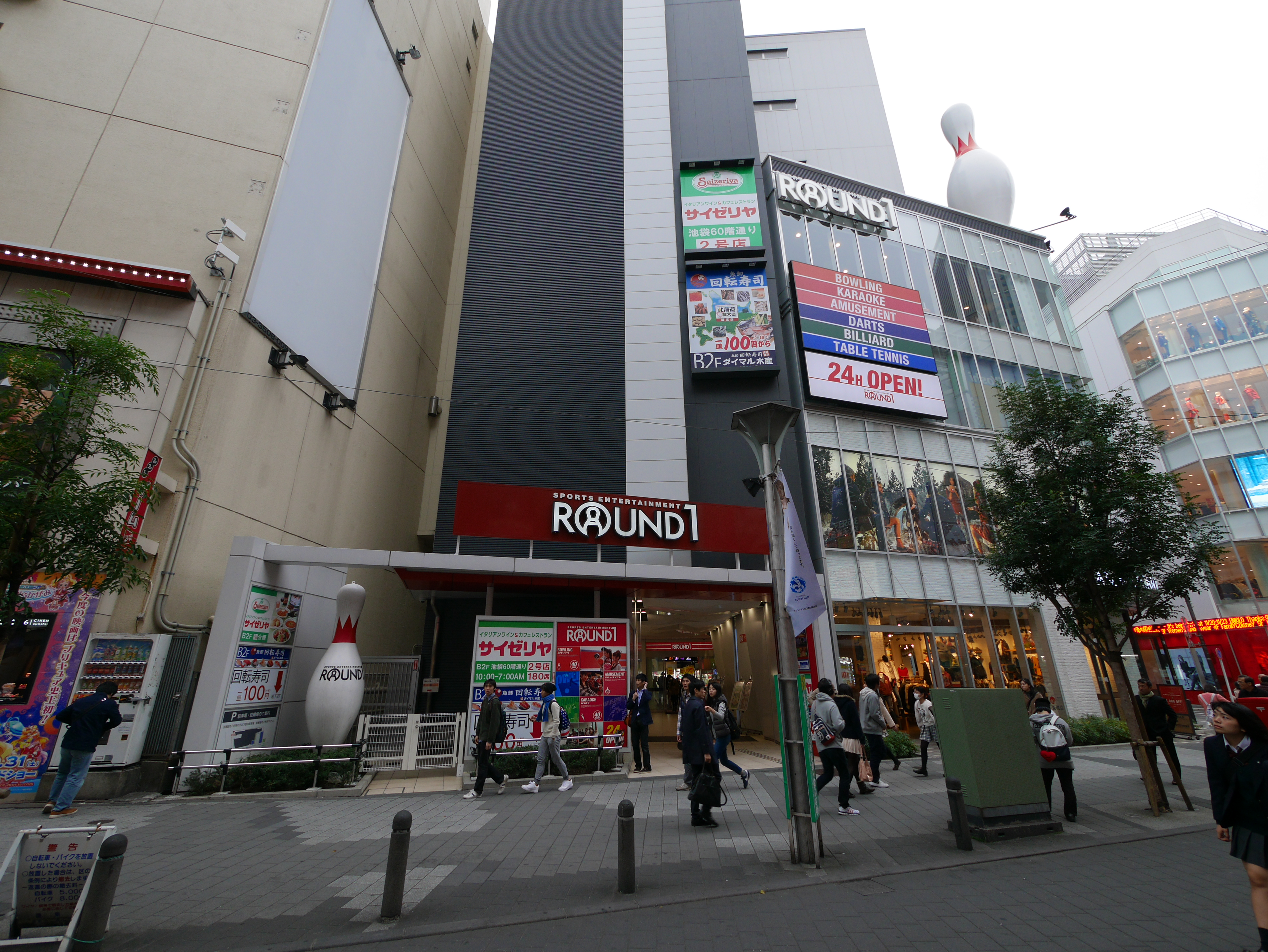 1 Chome Nishiikebukuro, Toshima-ku, Tōkyō-to 171-0021, Japan